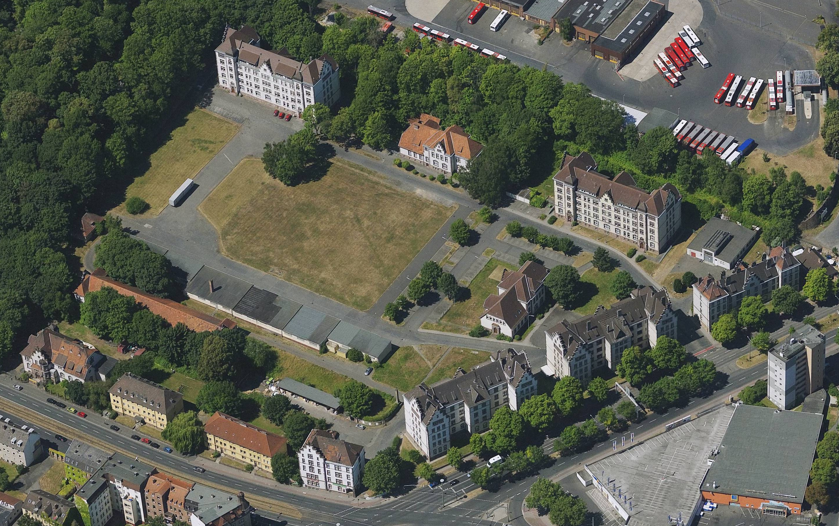 Ehemalige Jägerkaserne in Kassel